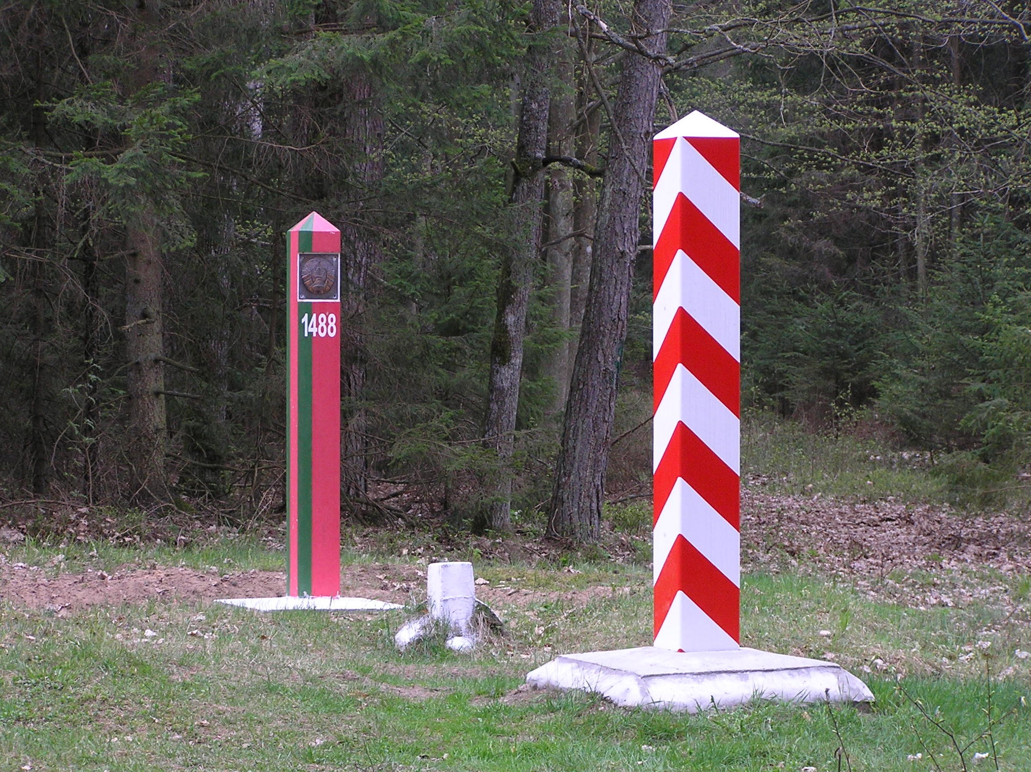 Granica Polsko - Białoruska, Białowieża forest, [1]